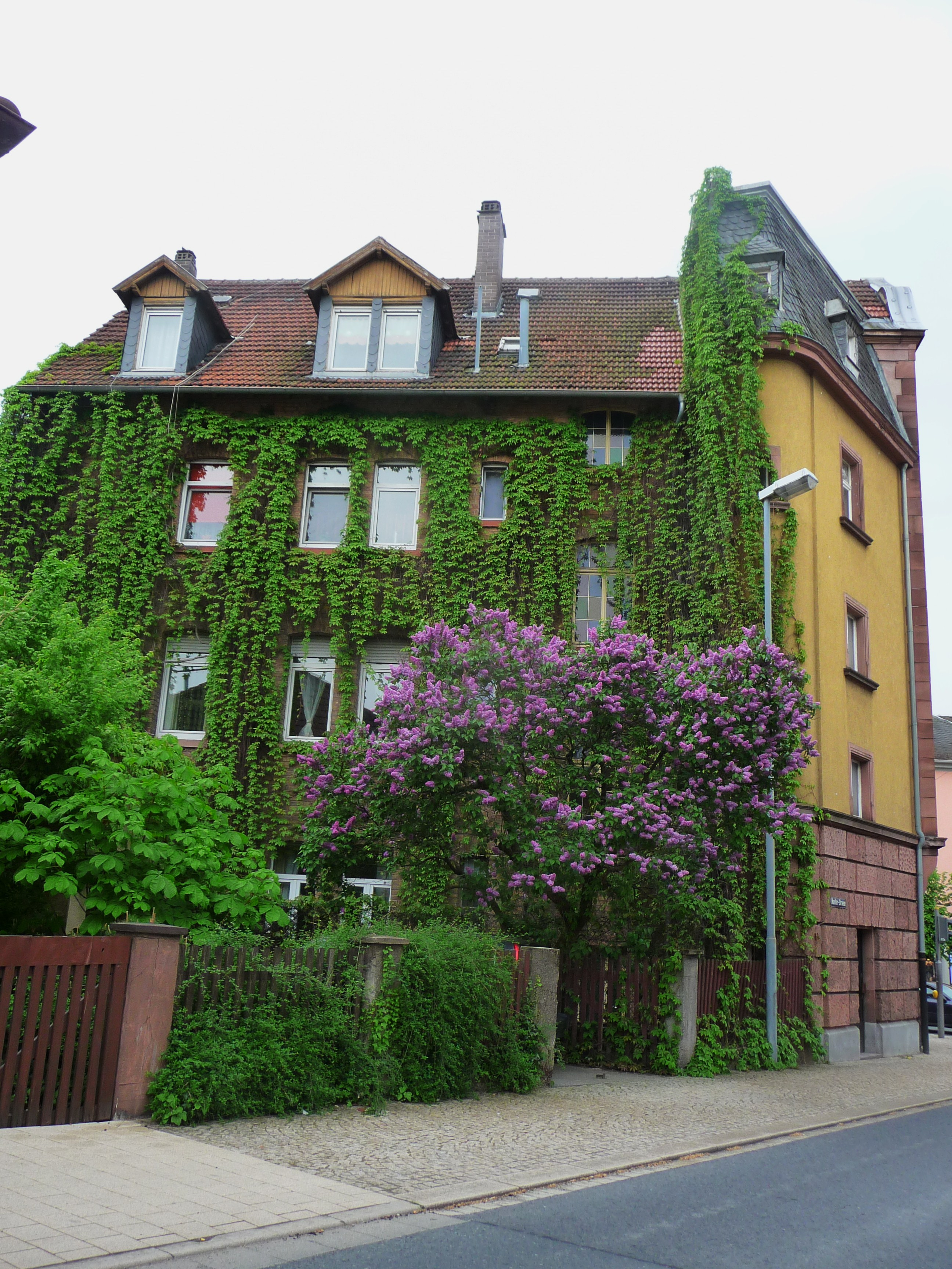 Wohnhaus in Schwetzingen (Baden-Württemberg, Deutschland)